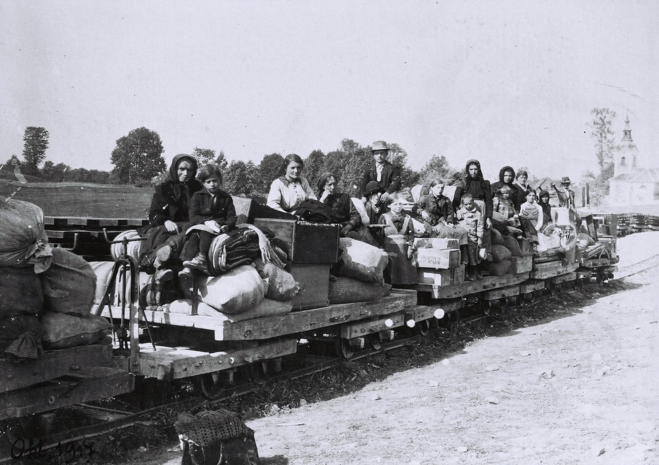 Begunci iz Čepovana na vagonih poljske železnice v Godoviču. Do Idrije so se pripeljali z vojaškimi tovornjaki, ki so se prazni vračali z bojišča po vojaški material v Godovič ali Logatec.